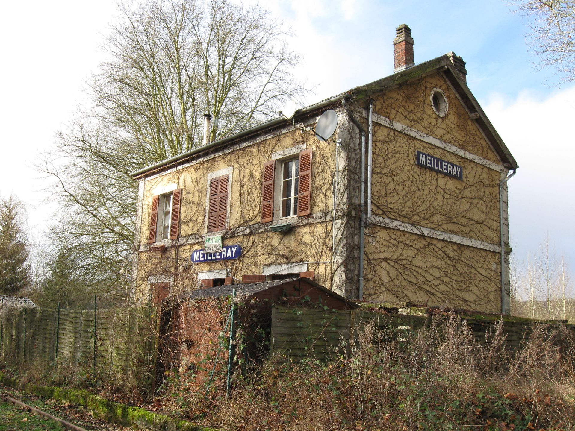 Ancienne gare de Meilleray sur la ligne La Ferté-Gaucher-Sézanne déclassée en 1990, terminus actuel du « vélo-rail » de La vallée du Grand-Morin. (département de la Seine-et-Marne, région Île-de-France).